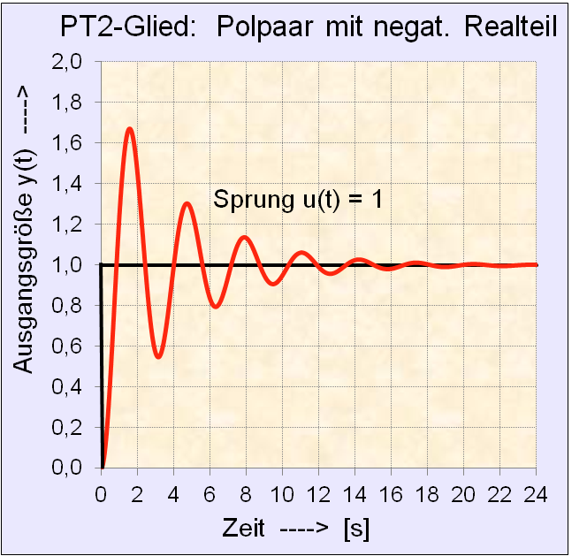 Sprungantwort eines PT2-Gliedes mit konjugiert komplexem Polpaar mit negativem Realteil.